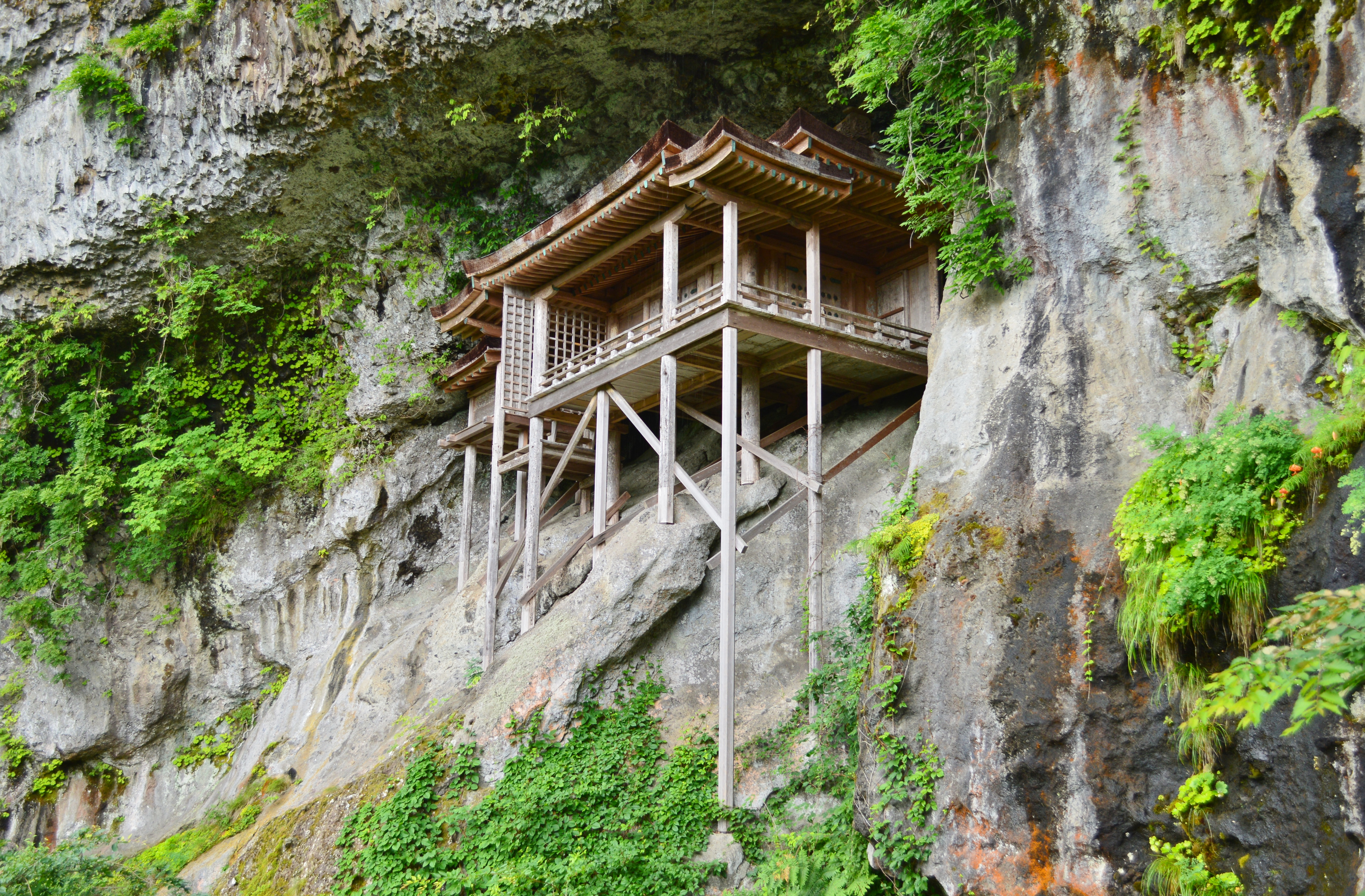 三仏寺 投入堂